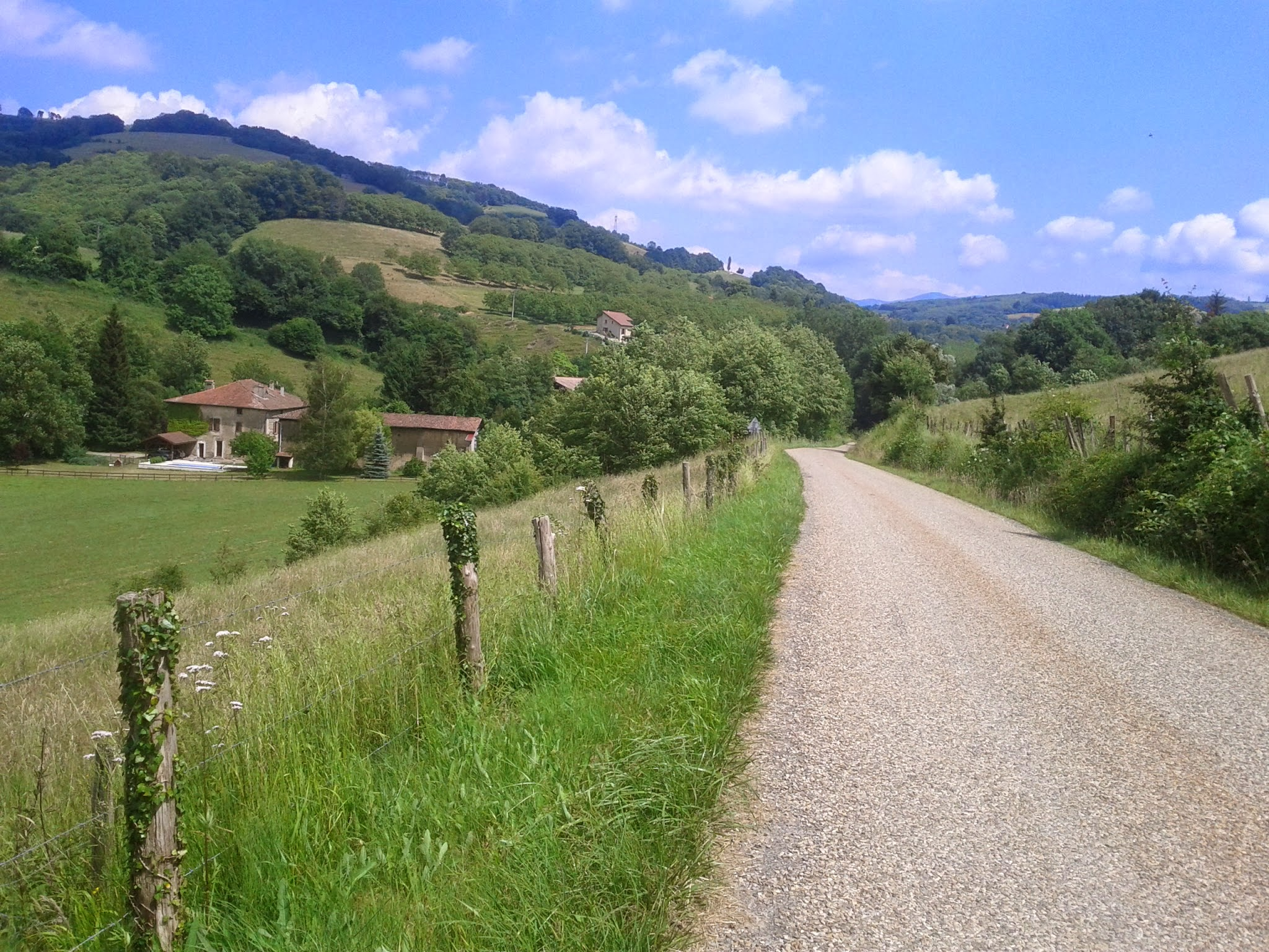 Vers Saint-Michel-de-Saint-Geoirs (Isère)